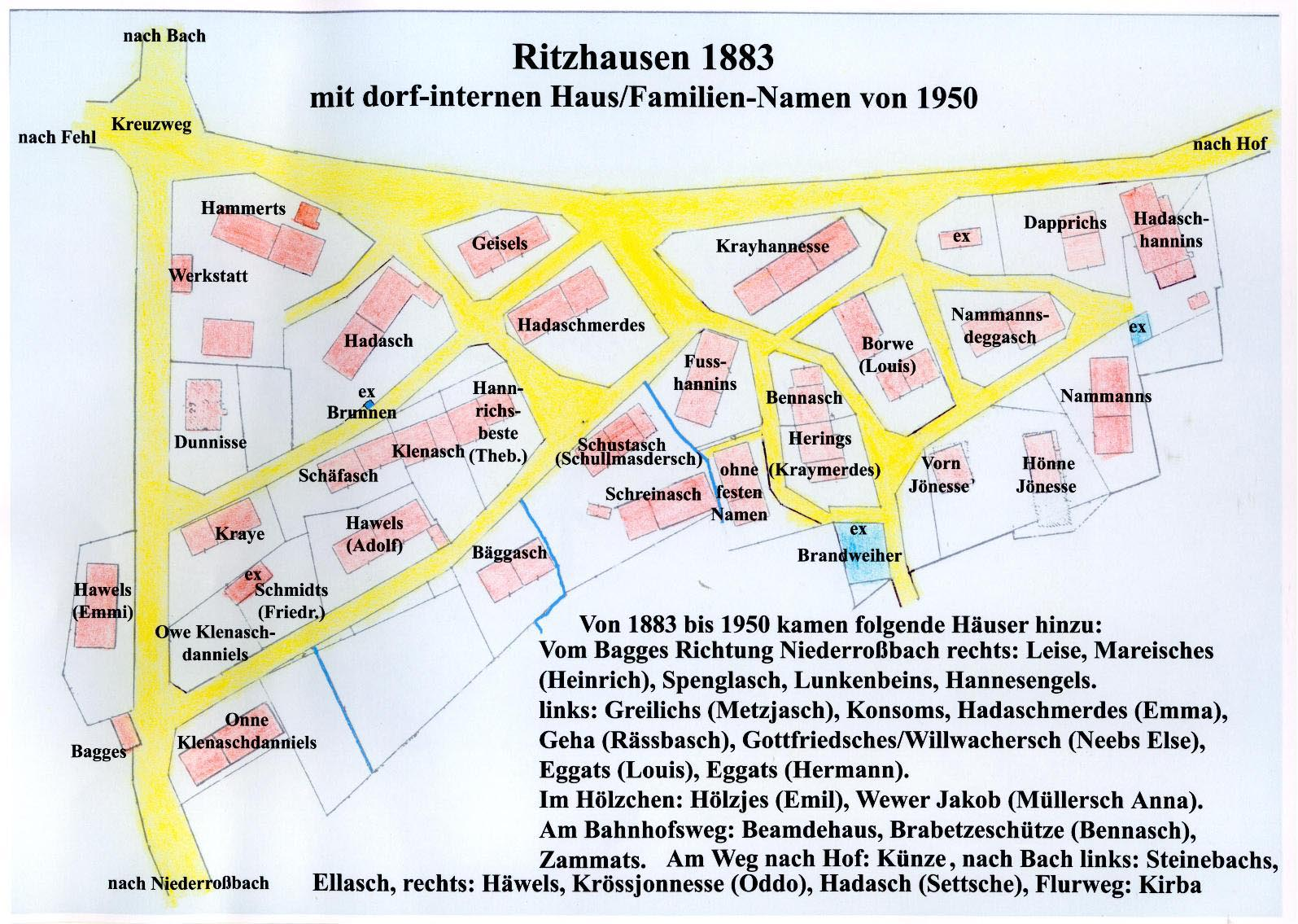 Hausnamen im Ortsteil Ritzhausen von Fehl-Ritzhausen